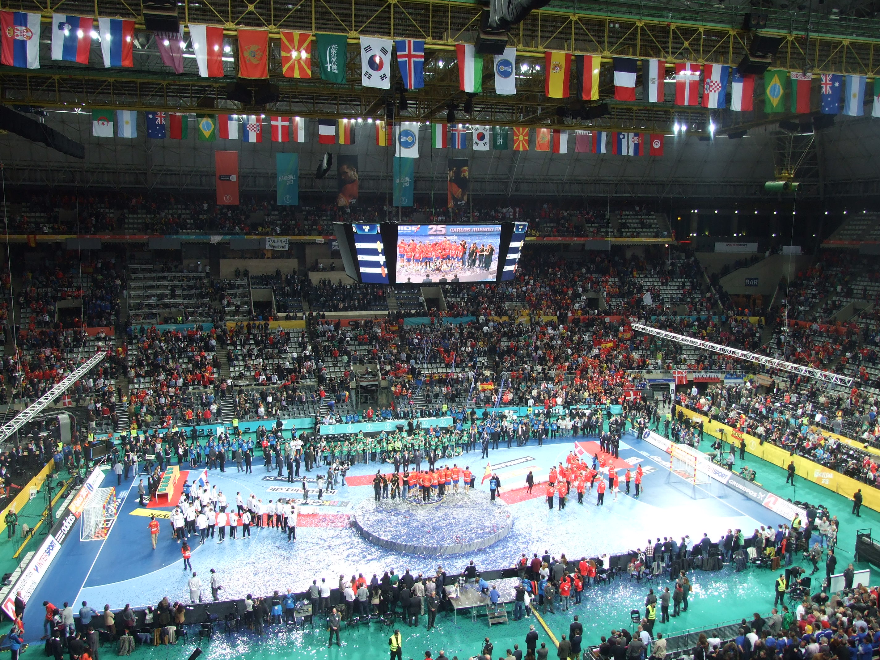 Celebración Campeonato del Mundo de balonmano 2013 celebrado en el Palau San Jordi